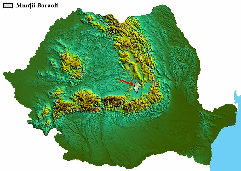 Munţii Baraolt